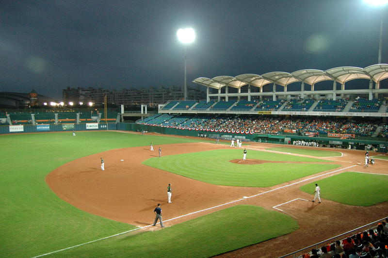 台北縣立新莊棒球場